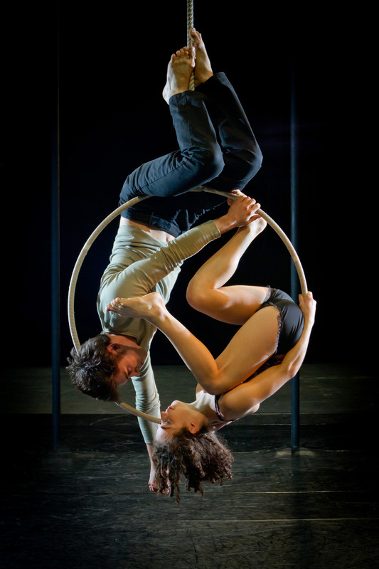 Sequence8 7ddlm PhotoAffiche